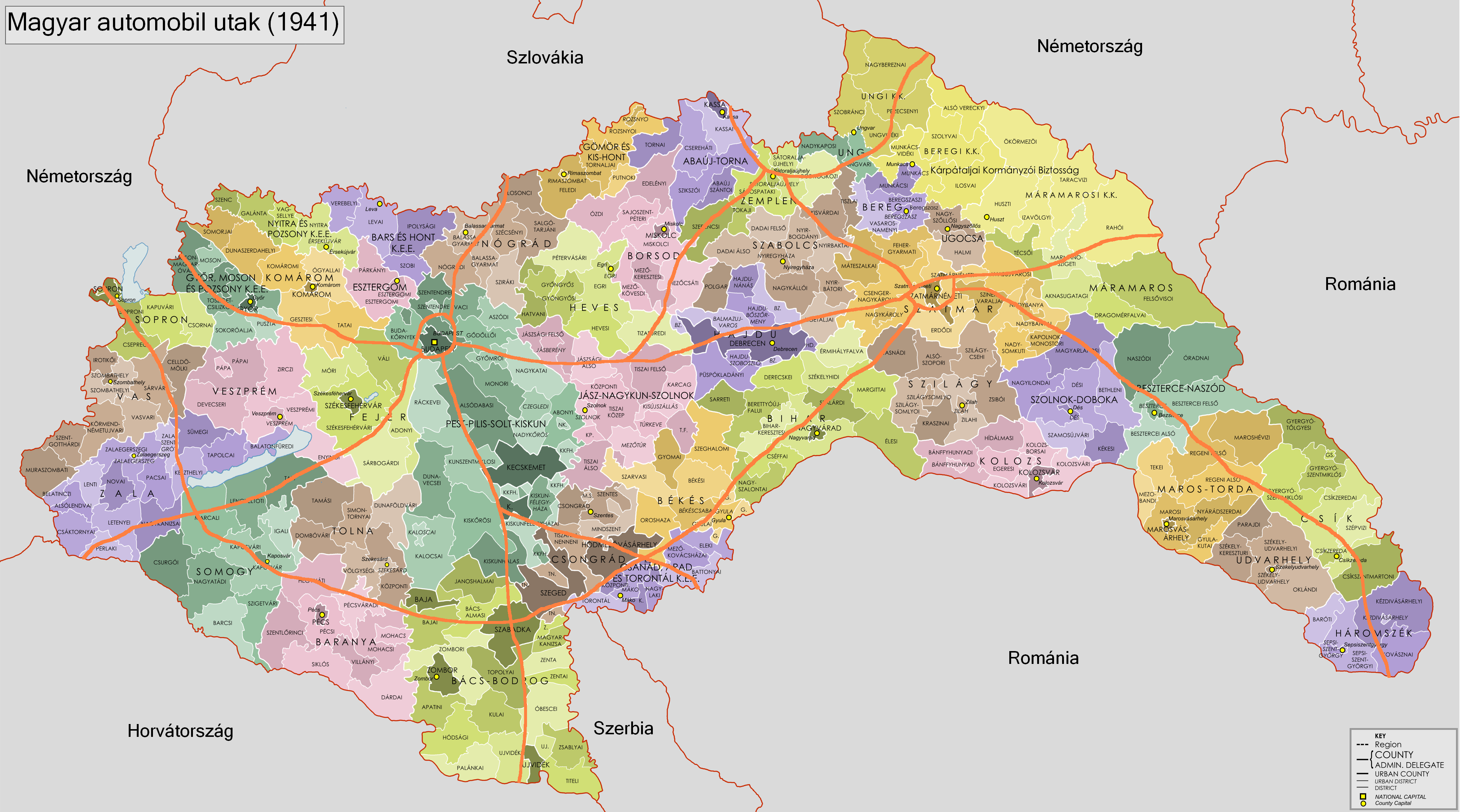 Térkép az első automobil utakról, 1941-ből